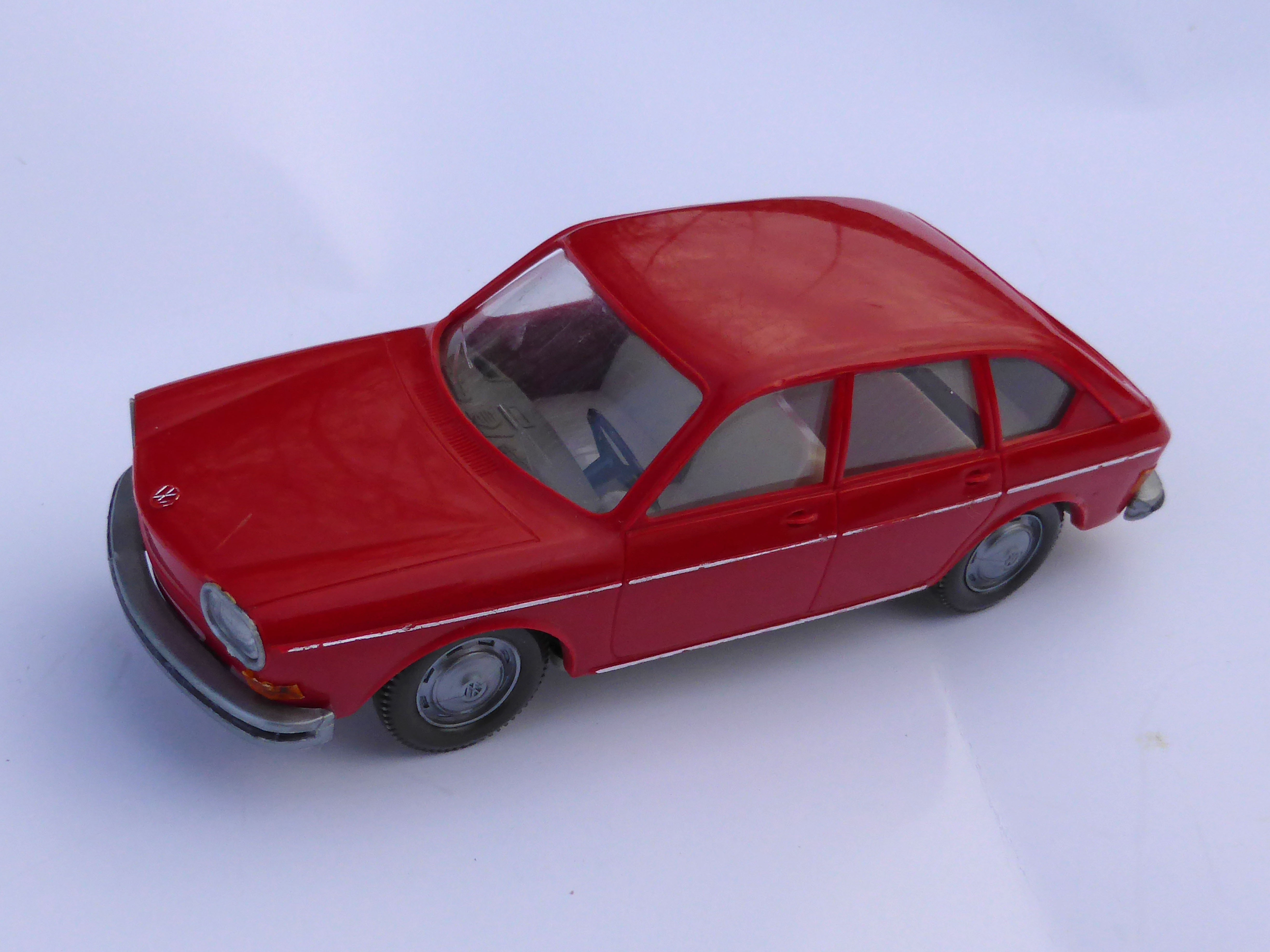 Modell von Cursor des VW 411 im Maßstab 1:40 aus der Zeit um 1970.